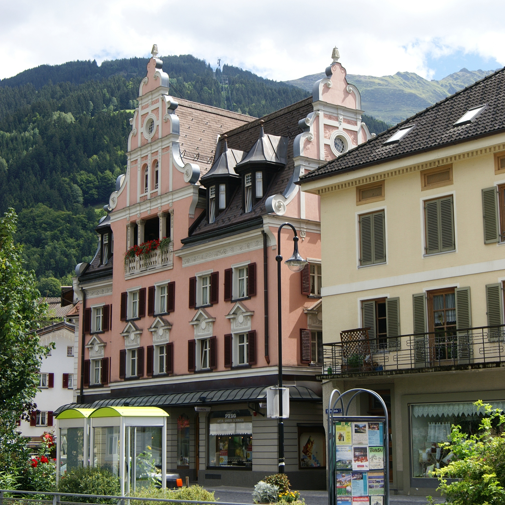 Haus Maklott, Umbau (um 1900) Auftraggeber Peter Franz Maklott, Kolonialwarenhändler, Silbertalerstrasse 4 in Schruns Montafon, Architekt Hanns Kornberger, Jugendstil und romantischer Späthistorismus